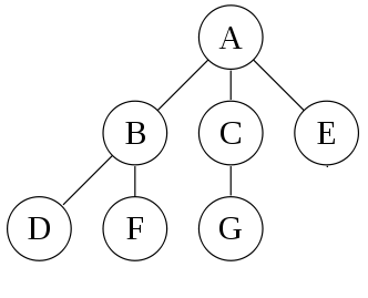 Ένα δέντρο για παράδειγμα διαπέρασης δέντρων